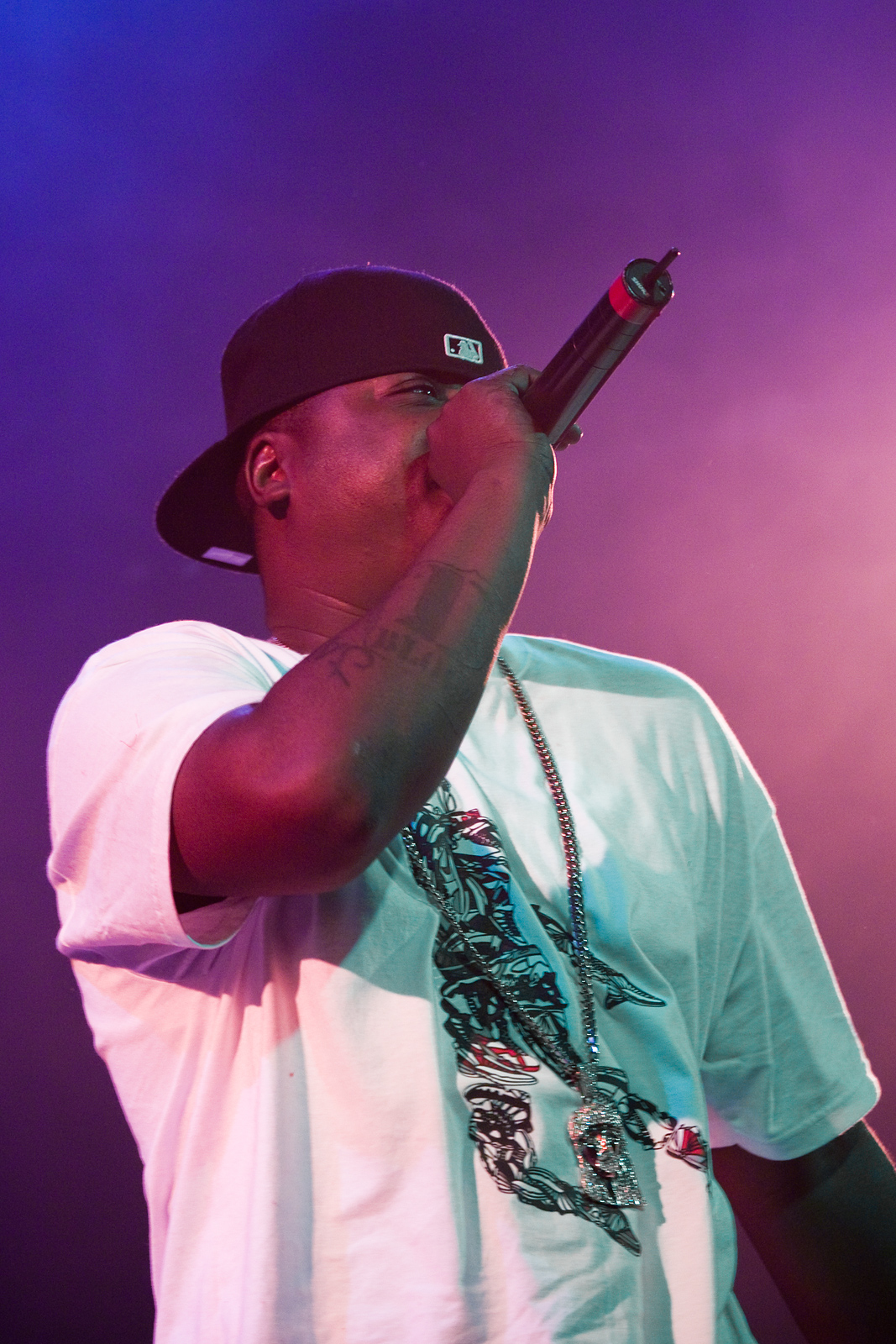 Jason T. Philips (New York City, 27 mei 1975) is een Amerikaanse rapper. Zijn artiestennaam is Jadakiss. Hij maakt deel uit van D-Block, samen met Styles P., Sheek Louch en J-Hood en zit met dezelfde rappers (behalve J-Hood) in rapgroep The LOX. -- Jadakiss @ optreden Melkweg "The Max" 23 sept. 2009.